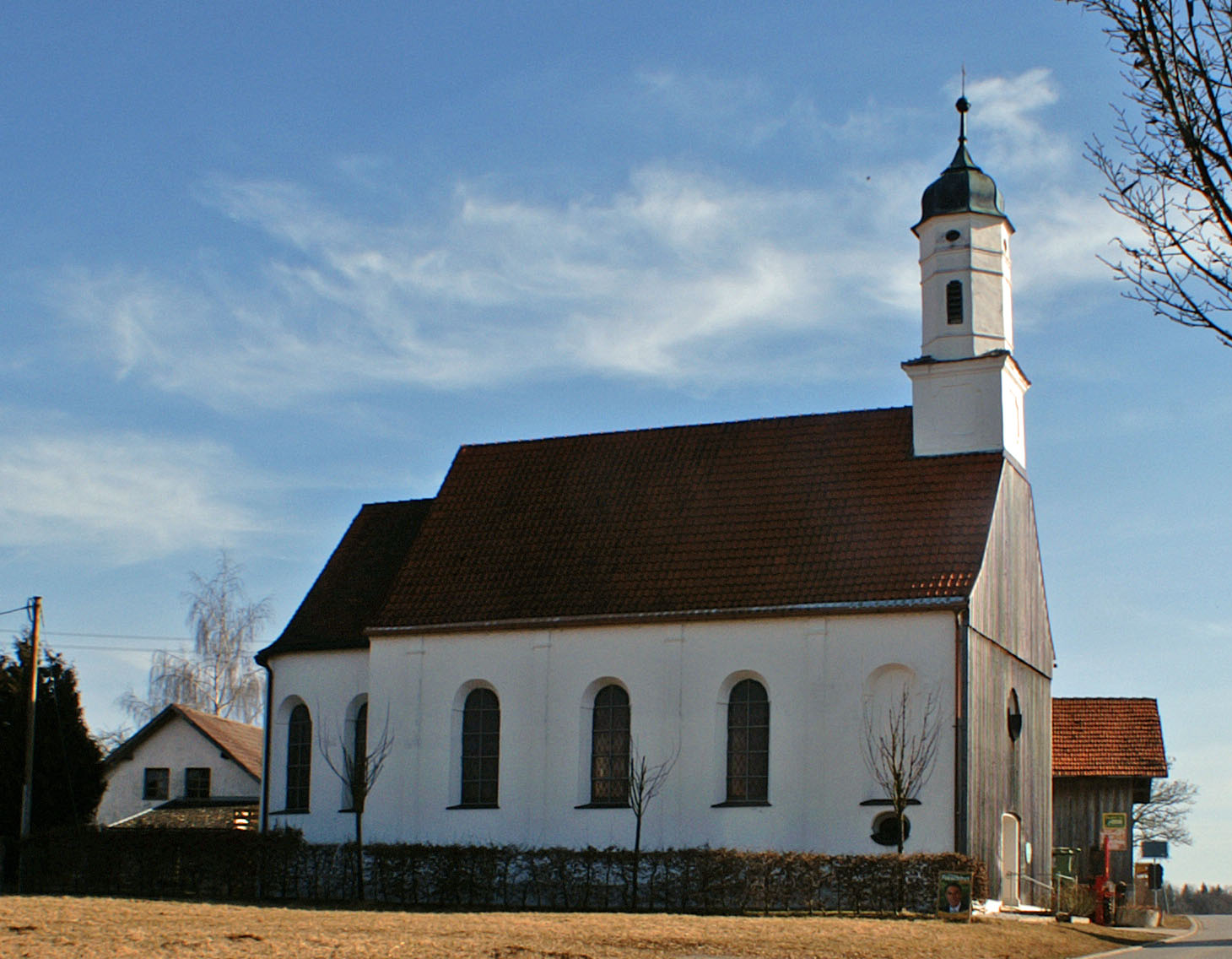 Kapelle in Ingenried, Pforzen